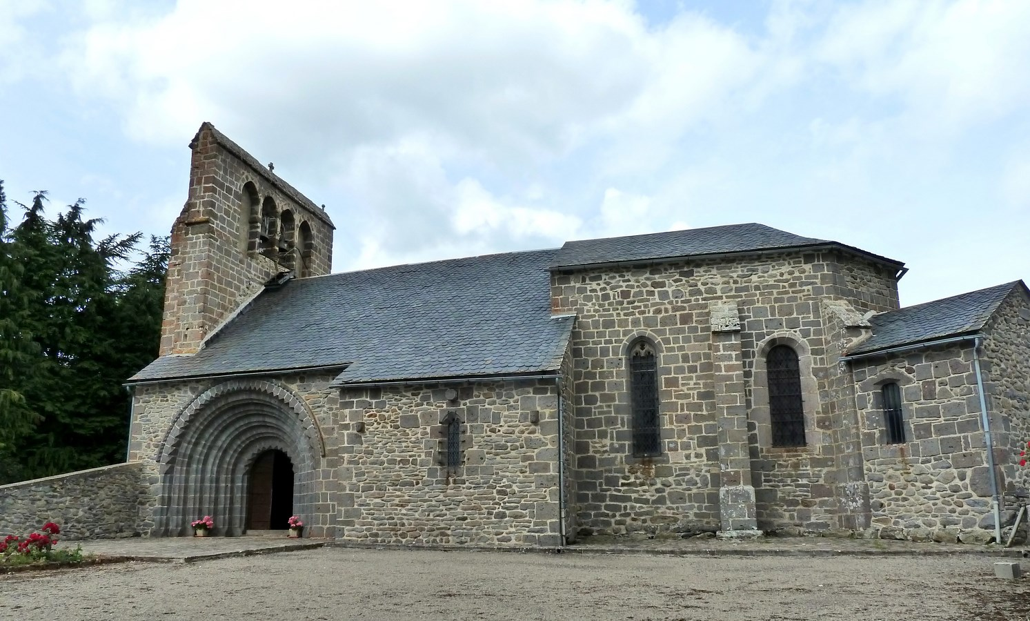 Eglise de Vernols, Cantal, France